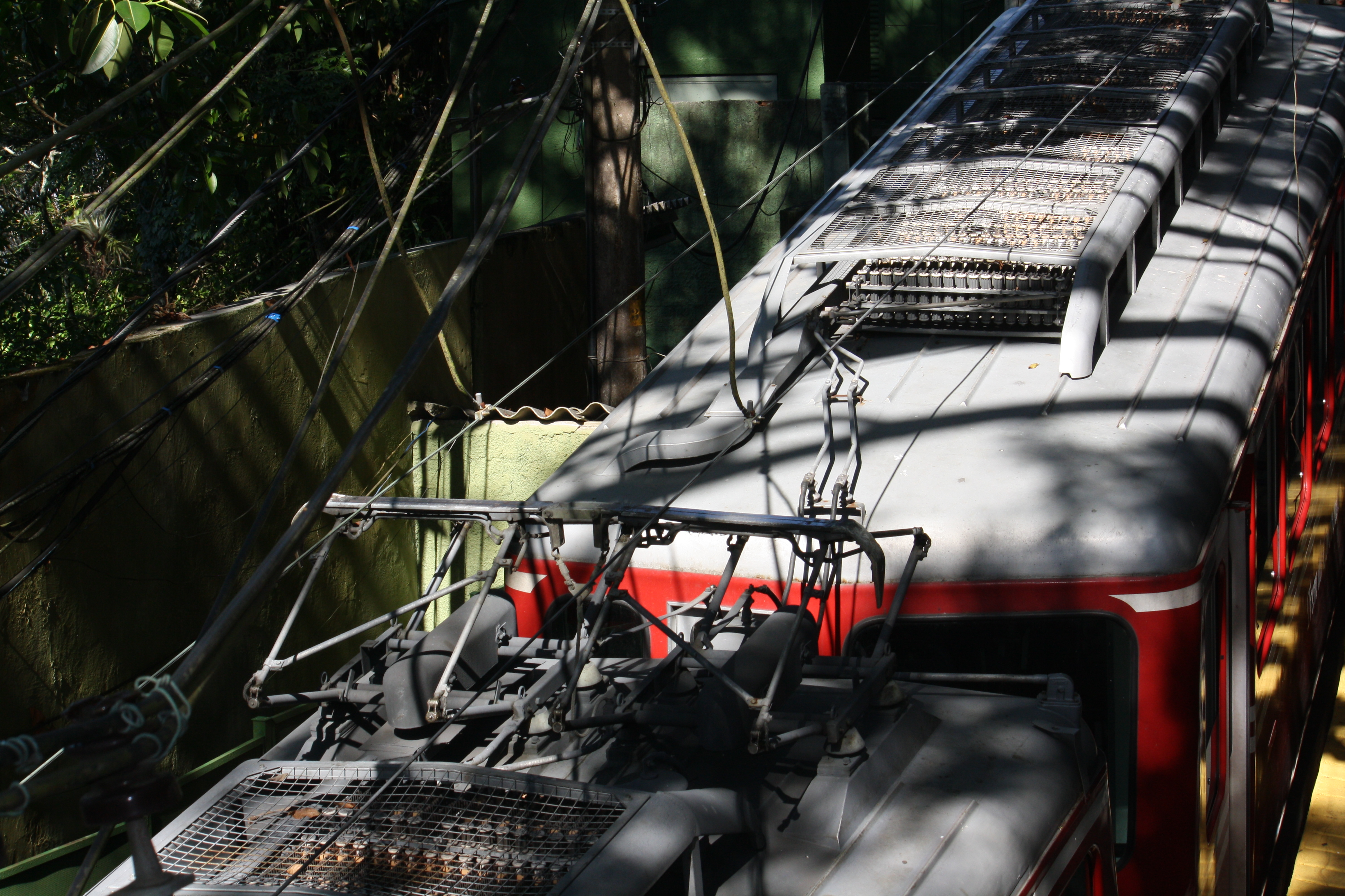 Teto com pantógrafos no Trem do Corcovado na Estação Cristo Redentor